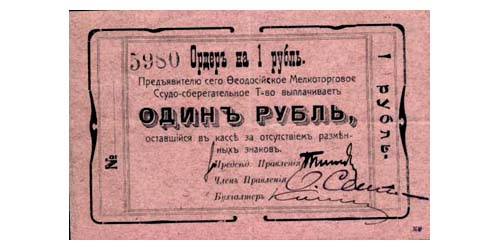 Ордер 1 рубль Феодосийского мелкоторгового ссудно-сберегательного товарищества 1918 аверс